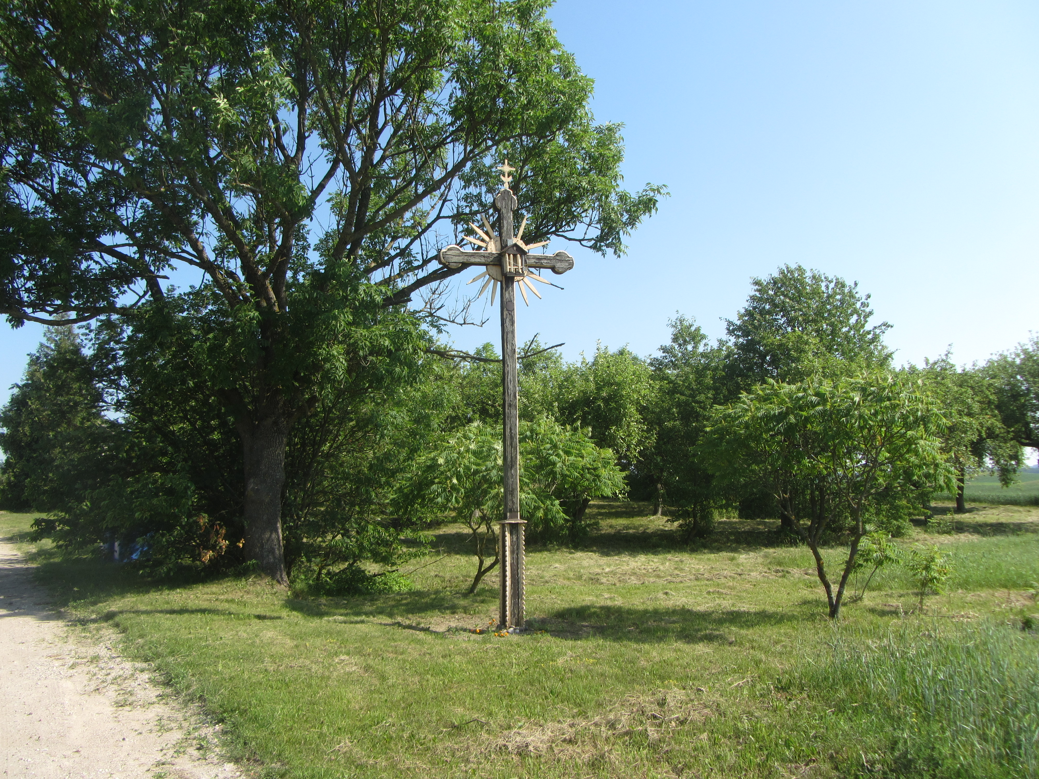 Šventežerio sen., Lithuania